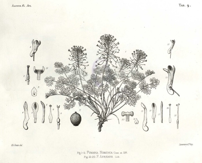 Lithographie de Fumaria numidica renommée Rupicapnos numidica